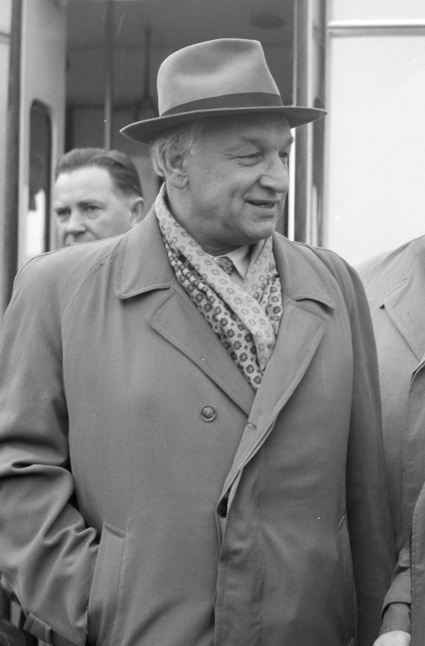 Justas Paleckis op Schiphol